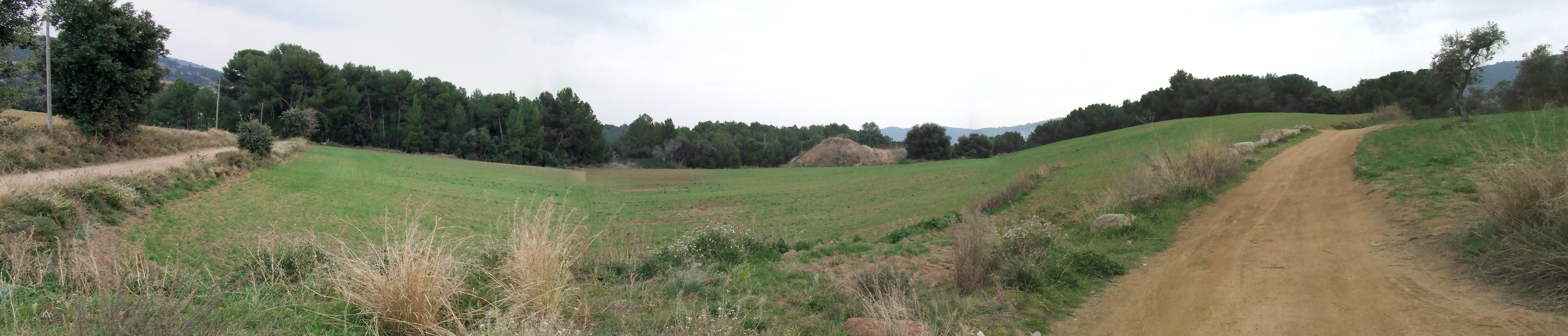 El Pla del Vermell, a Vallroja i el Pla (Bigues, Bigues i Riells, Vallès Oriental)